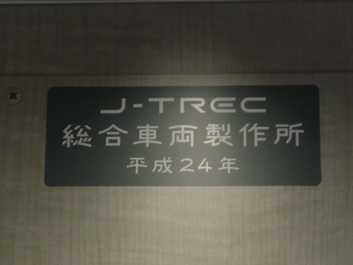 総合車両製作所(J-TREC)車内銘板（ステッカー）